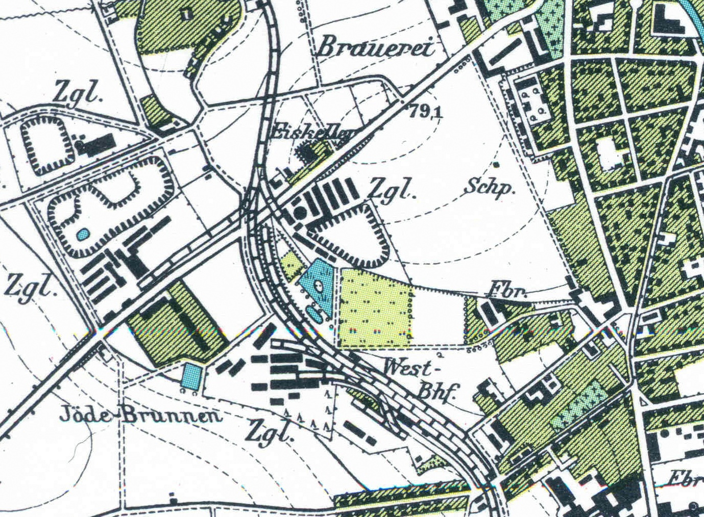 Braunschweig Stadtplan mit Vororten von 1899, Ausschnitt um den Westbahnhof